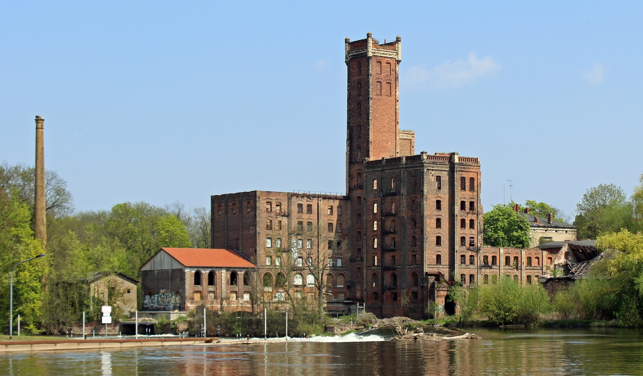 Papiermühle bei Halle